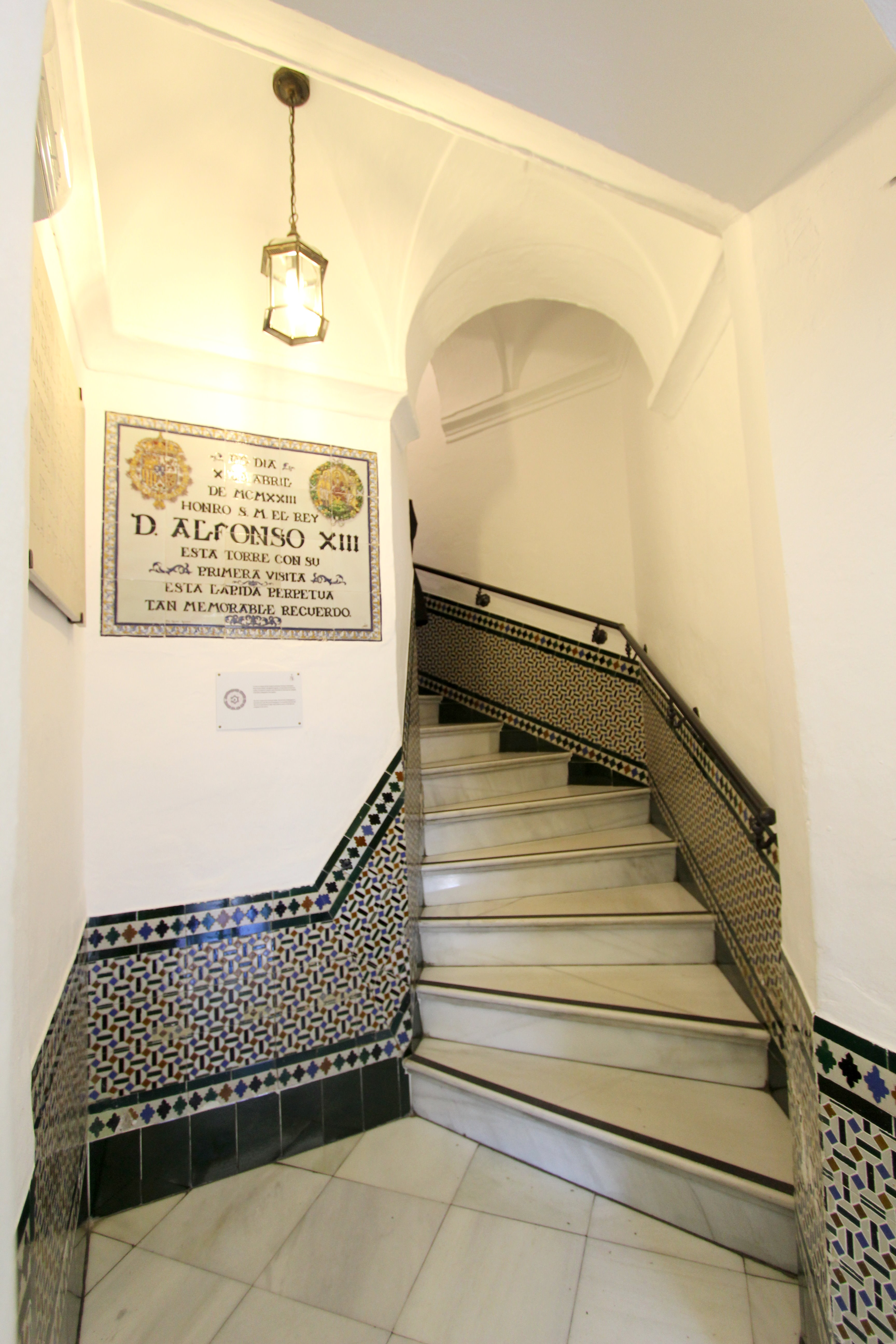 41001–41080 Sevilla. Torre del Oro. Treppenhaus im Turm. Aufnahme von 2018.